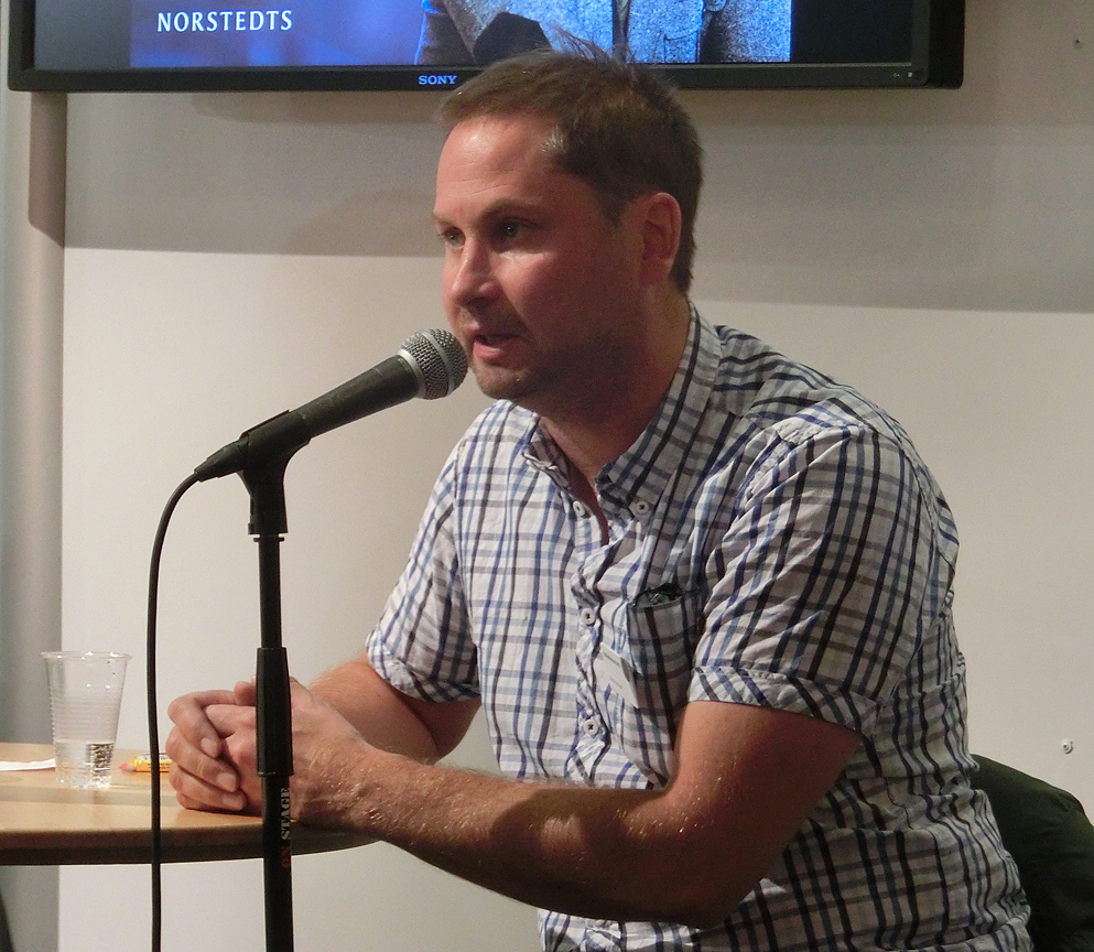 Henrik Arnsted talar om sin bok Älskade fascism på Bok- och Biblioteksmässan 2013 i Göteborg, Sverige.